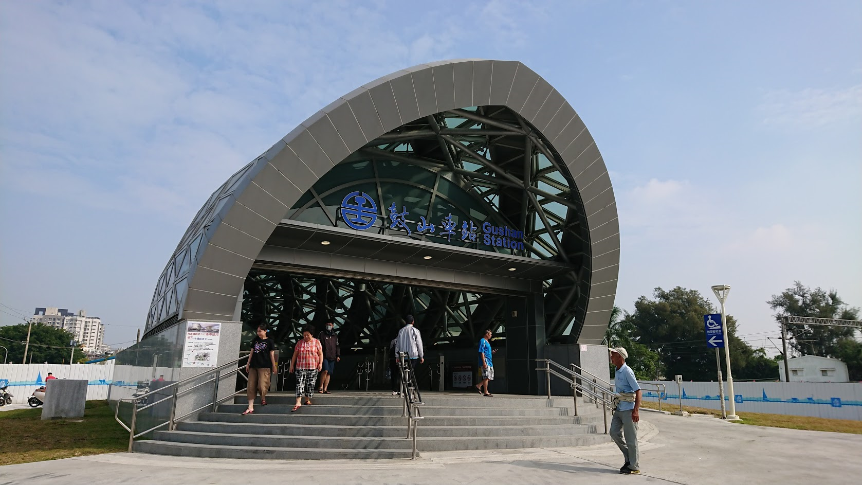 台鐵地下化鼓山車站(攝於2018.10.14)